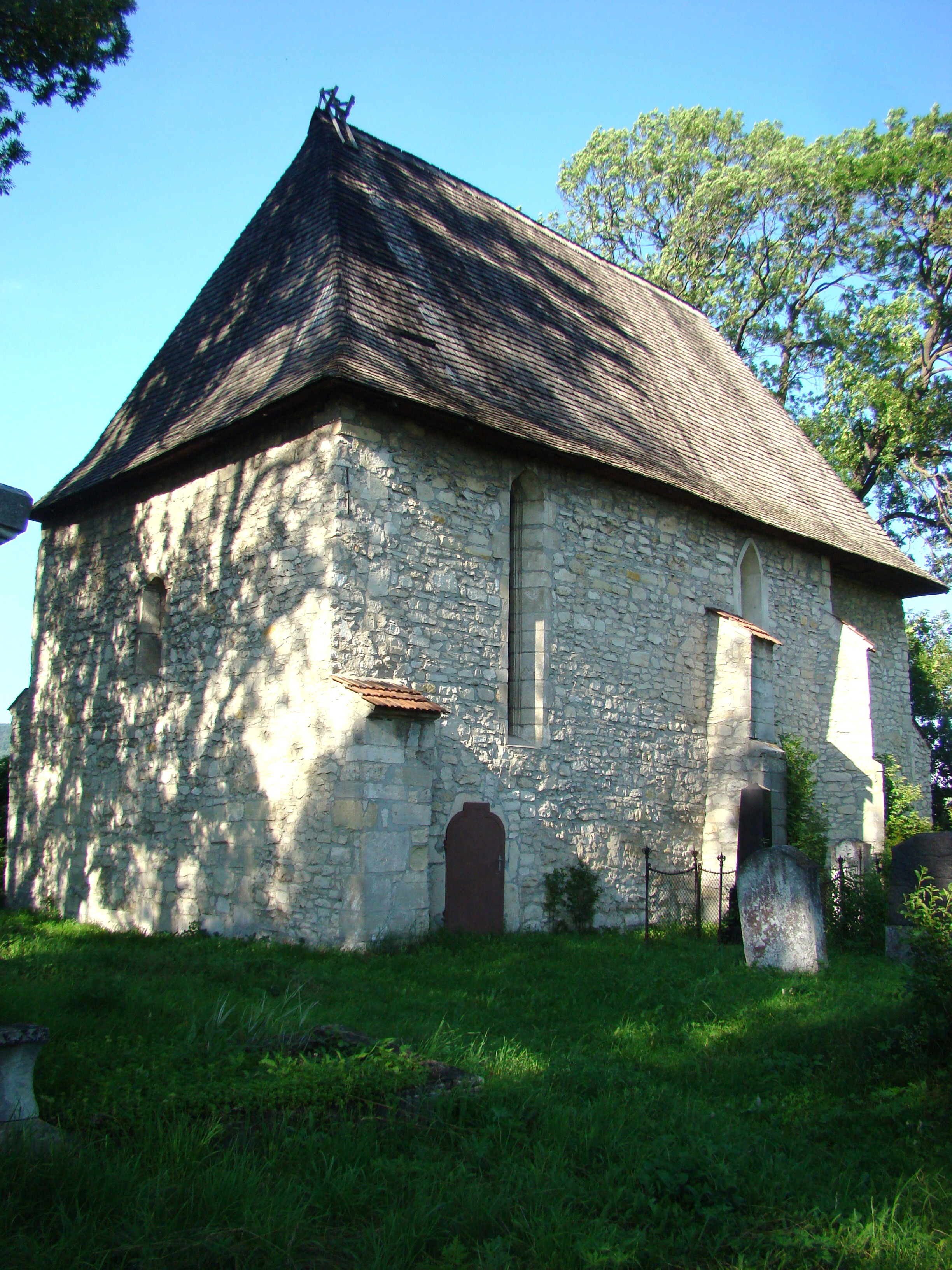 Biserica reformată, sat DOROLŢU; comuna AGHIREŞU, Cluj 01